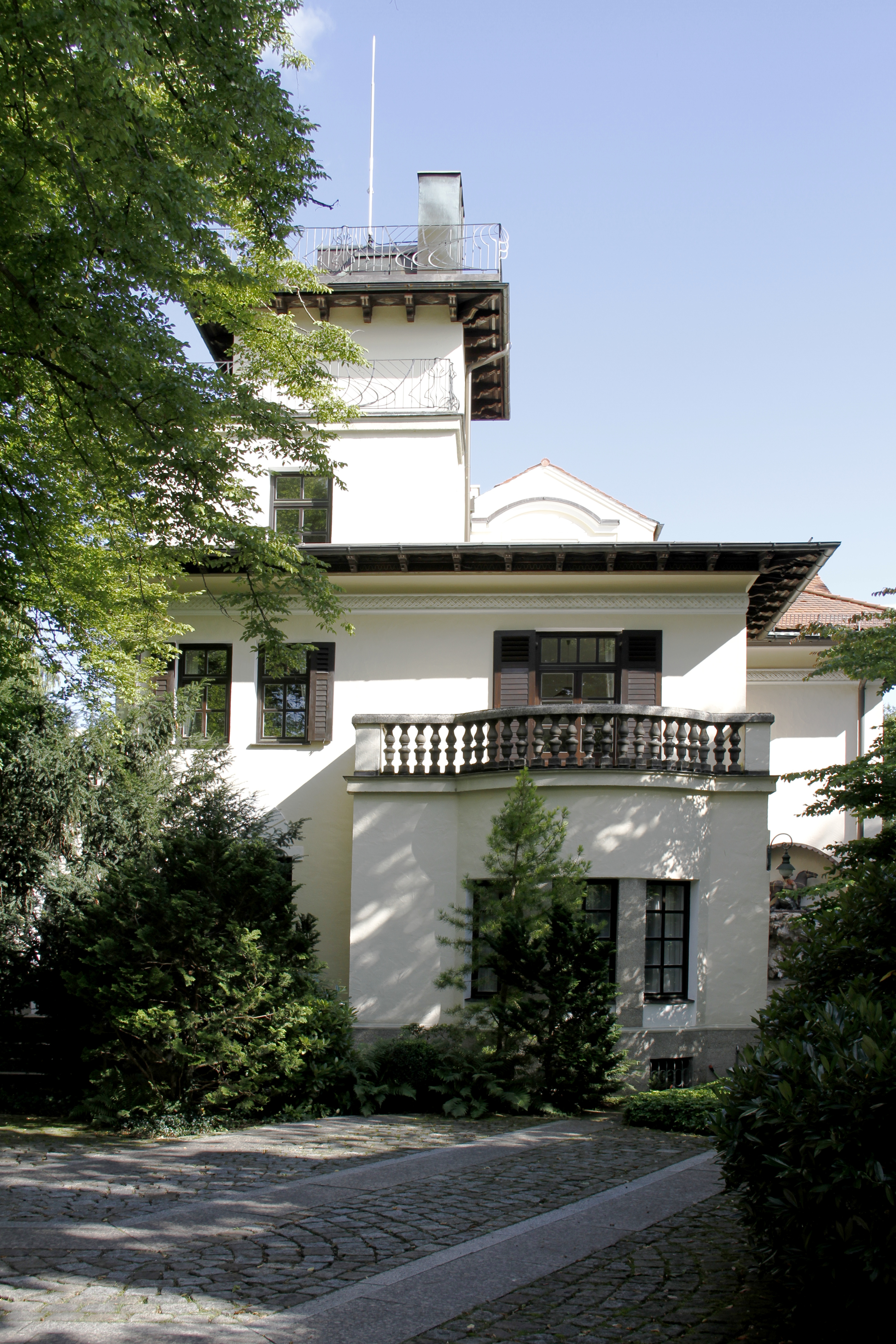 Heilmannstraße 21, italisierende Villa, 1899 von Architekt Franz Rank für Apotheker Karl Braun. Der Belvedereturm wurde 1905 hinzugefügt.